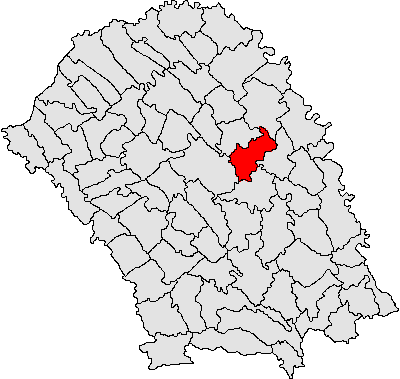 Categorie:Hărţi ale judeţului Botoşani